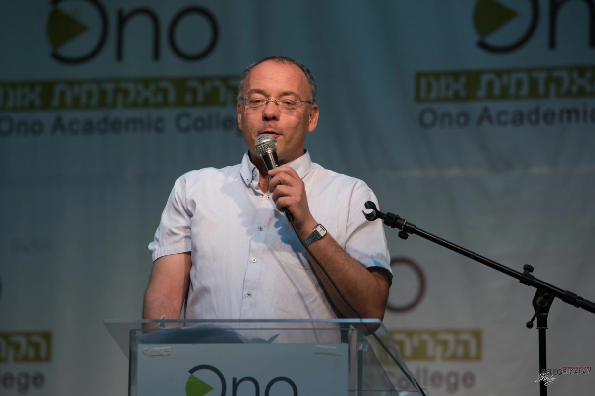 עו"ד בטקס השקת הספר "הוצאה לפועל - מעשה והלכה"